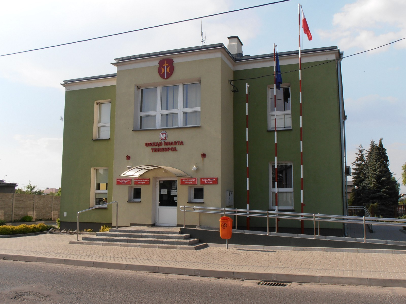 Urząd Miasta Terespol.